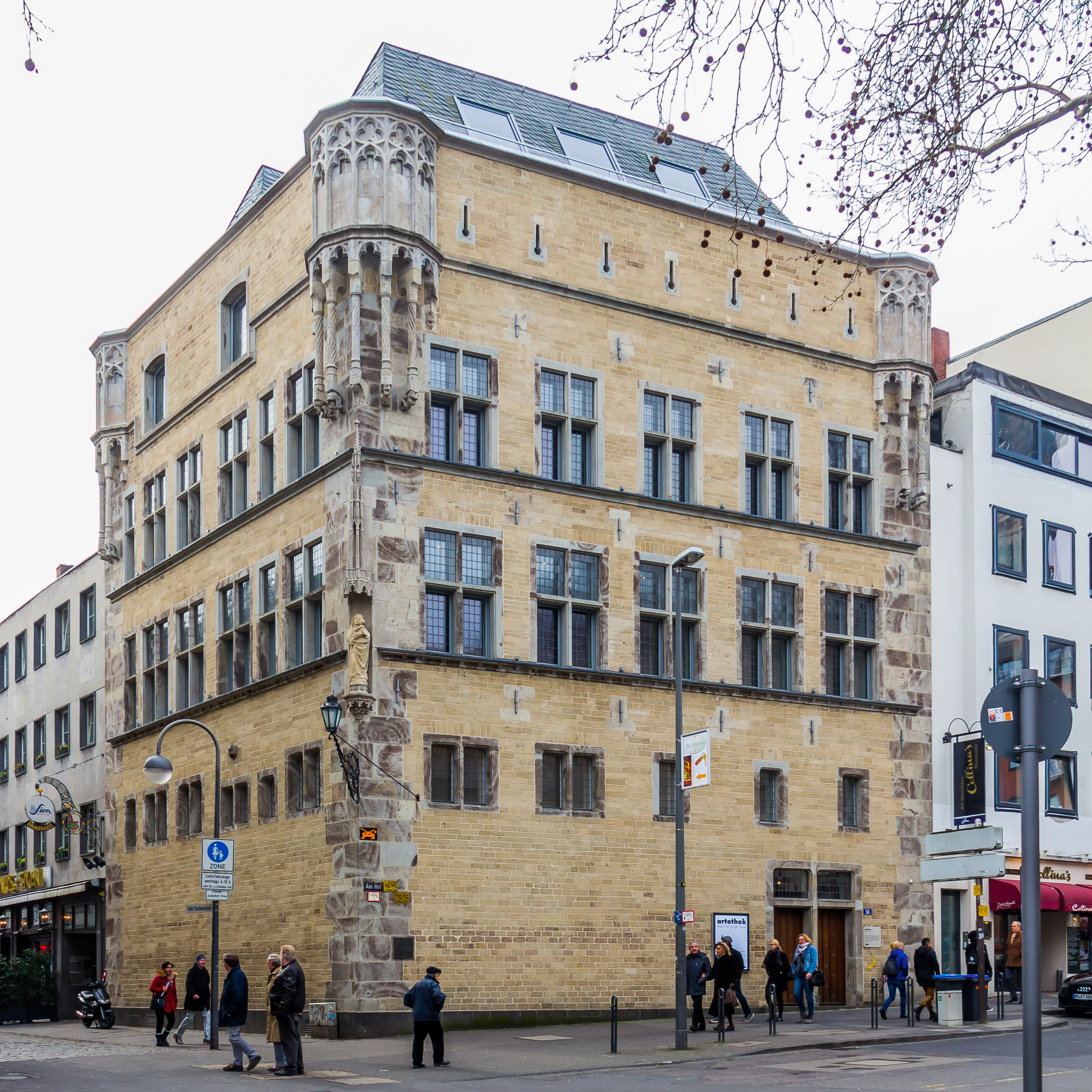 Denkmalgeschütztes Haus Saaleck, Köln. Am Hof 50, Ecke Unter Taschenmacher This is a photograph of an architectural monument.